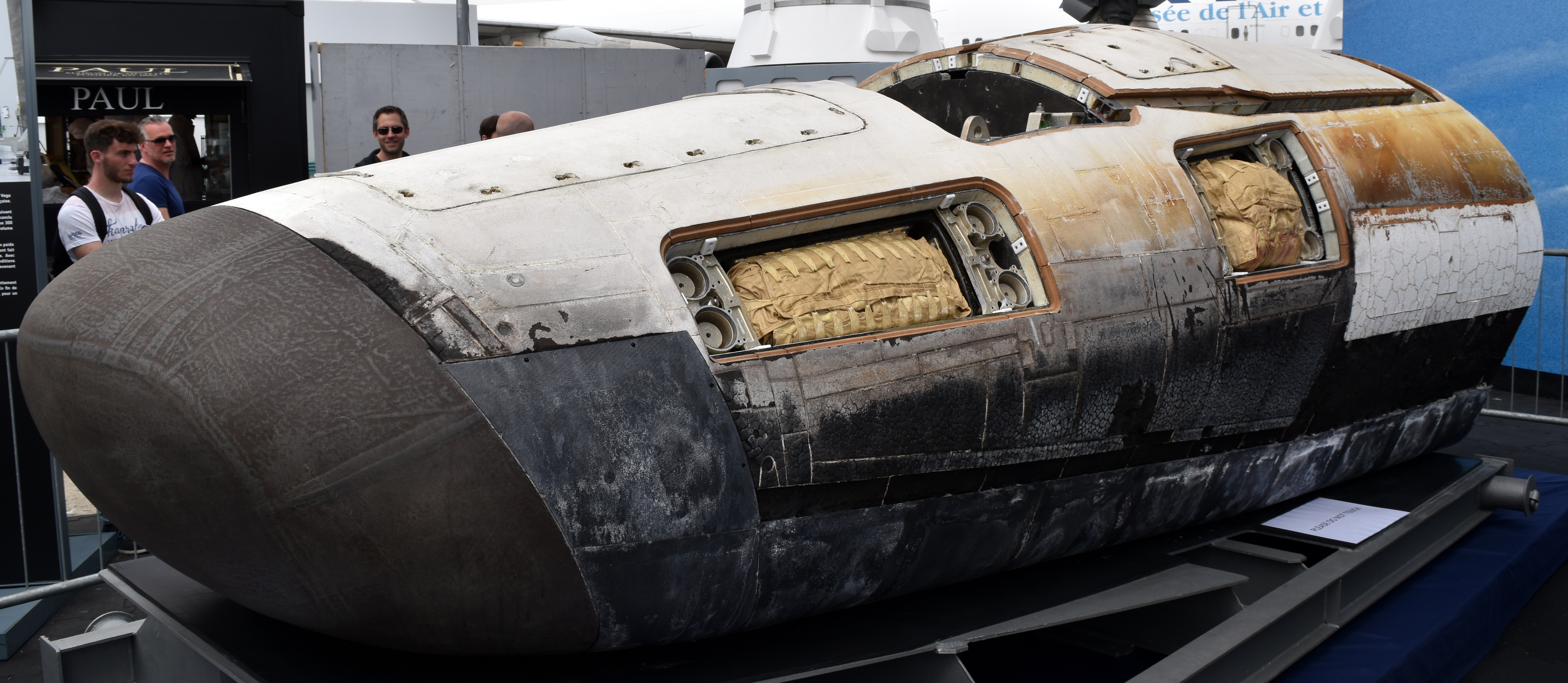 Demonstrateur corps portant IXV apres son vol de fevrier 2015 au salon du Bourget 2015